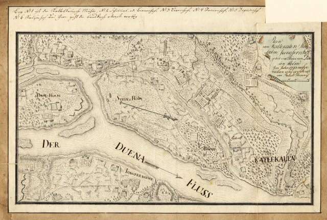 Scan from Johann Christoph Brotze's book Sammlung verschiedner Liefländischer Monumente. Plan von Katlekalen, Steinholm, Jungfernhoff und ein Stück von Dahlen Holm. Im Jahr 1793 aufgenommen und gezeichnet von Robert Renny